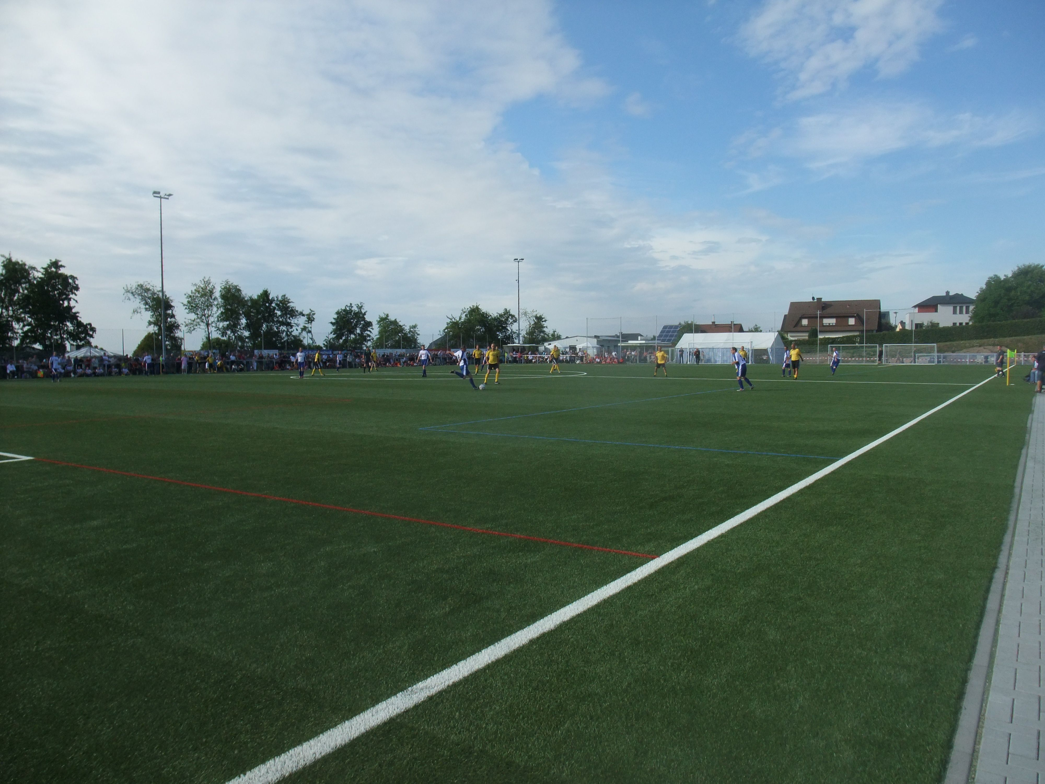 Sportfest Thomm 2010 Spiel der Bundesliga-Globetrotters gegen die Ü40-Auswahlmannschaft aus der Region Hochwald/Ruwertal (3:1)